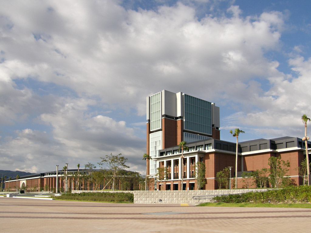 KobeGakuin univ. PortIsland Campus